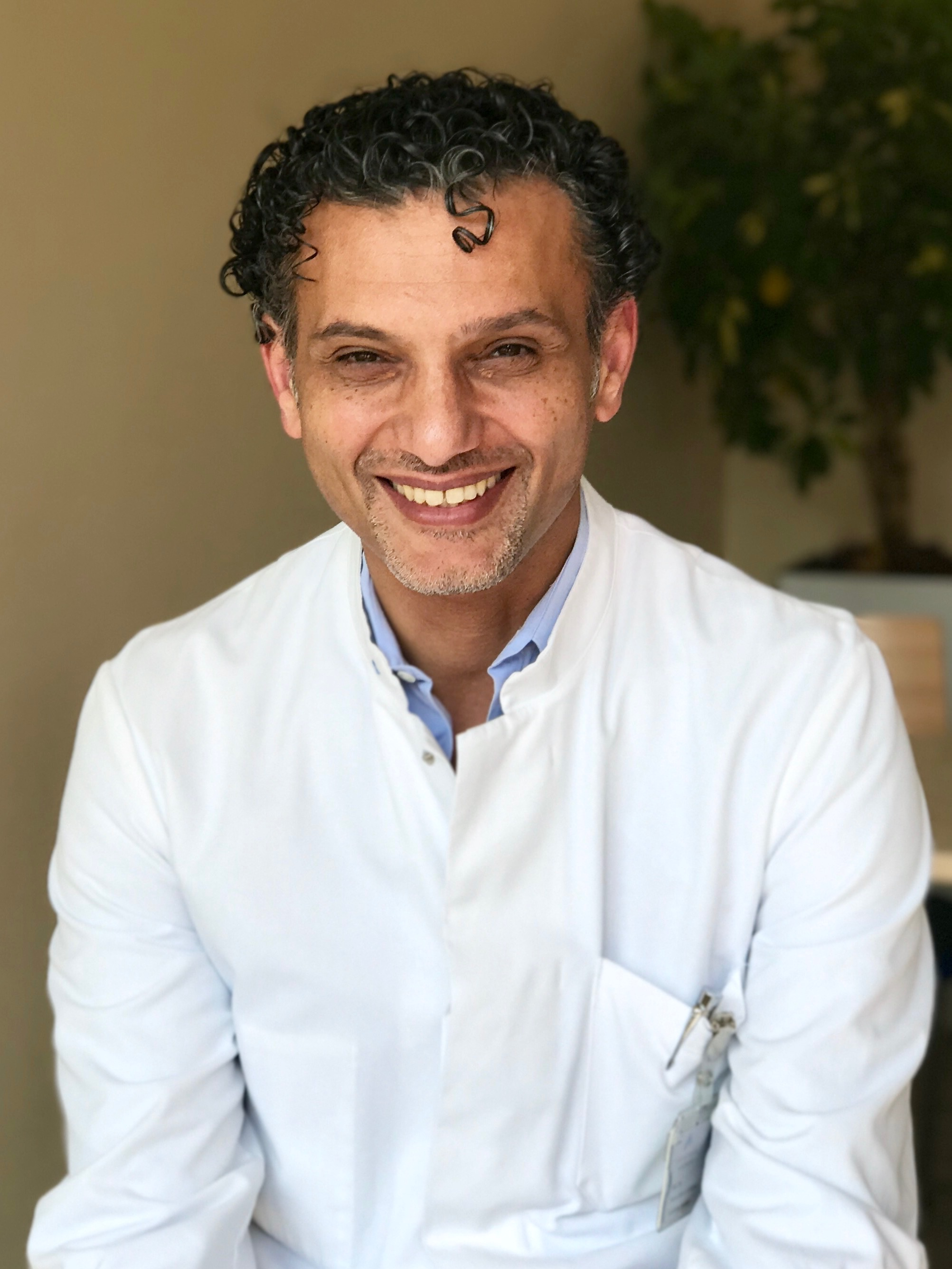 Prof. Dr. med. Salah-Eddin Al-Batran im August 2017